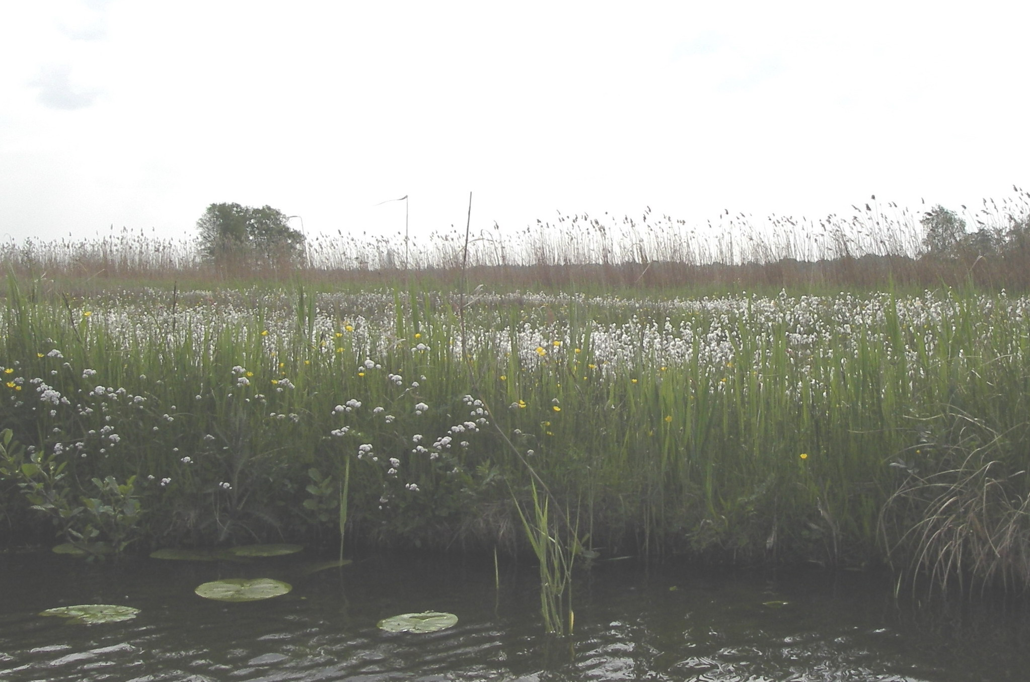 Verzuurd rietland met veenpluis in de nieuwkoopse plassen